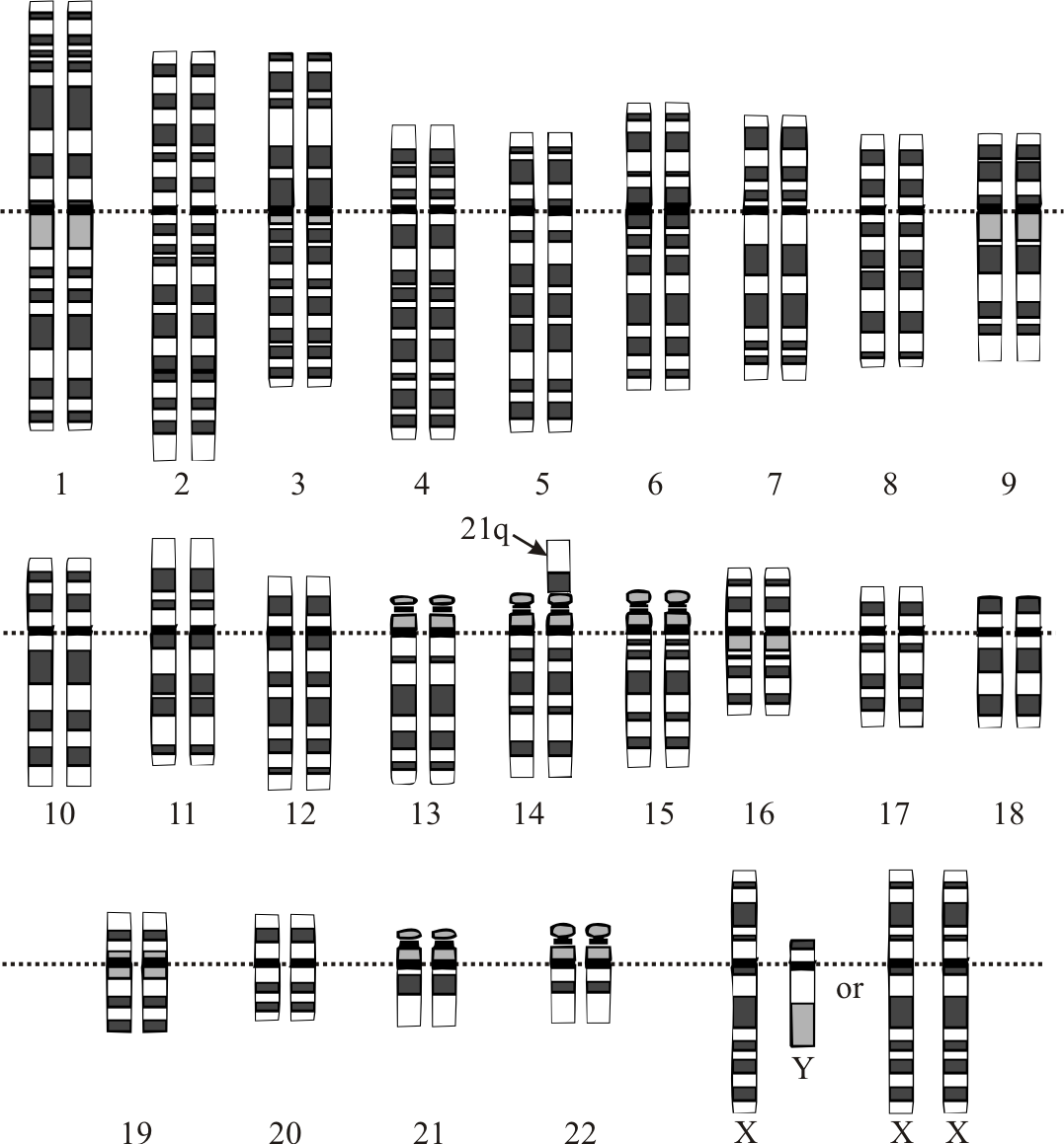 Down Syndrome translocation. It is a Robertsonian translocation. In the original image represents a reciprocal translocation. The change made was that the long arm of chromosome 21 fuses with the short arm of 14, and not to the length of 14.